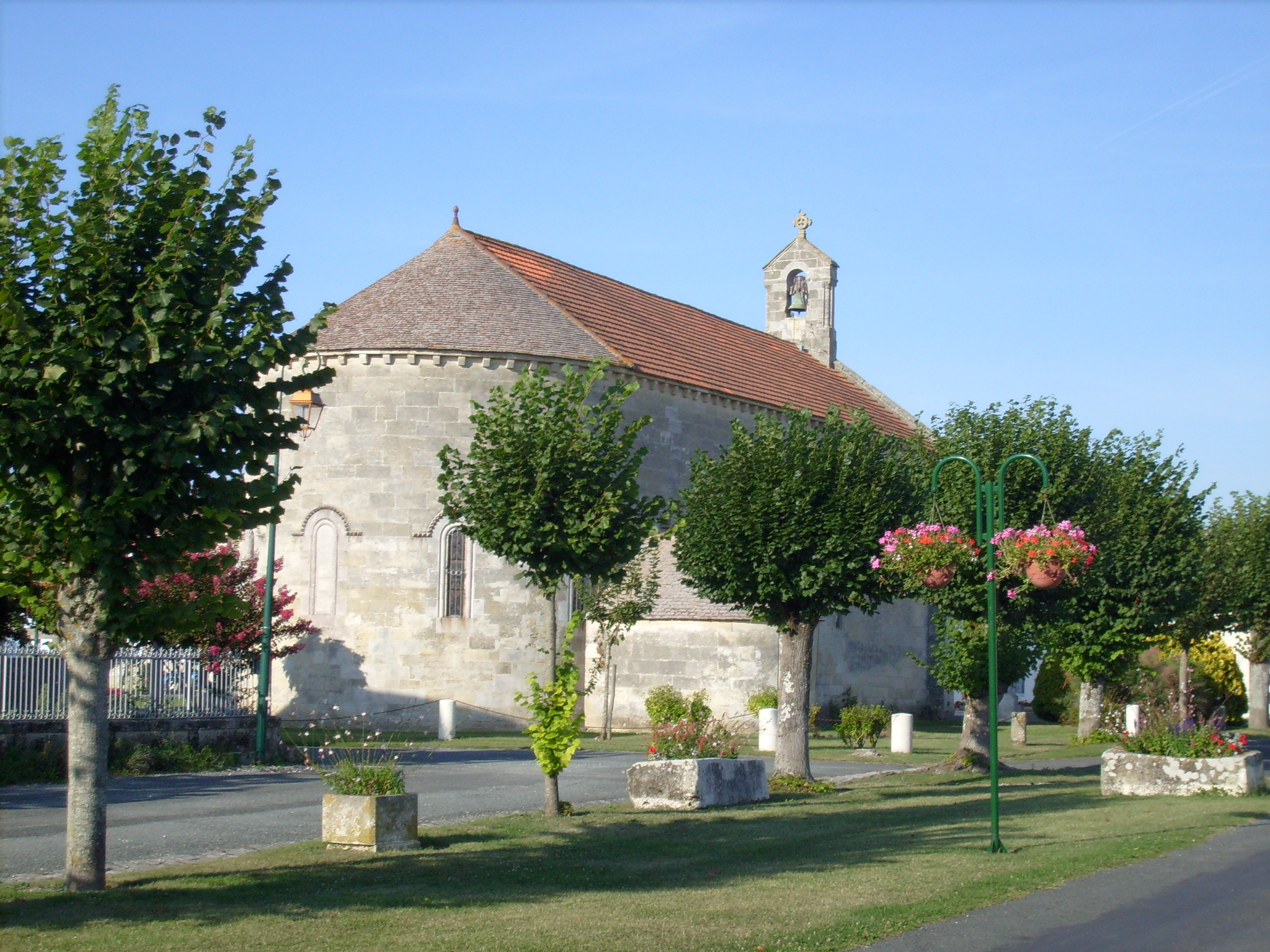 Eglise de Saint-Seurin d'Uzet